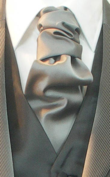 Rocheu de microfibra hecho a mano en un traje de ceremonia.